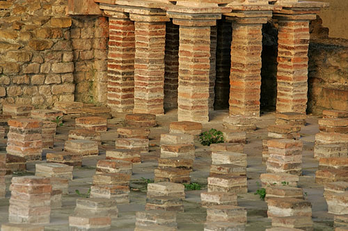 Avenches / Aventicum: Thermes de Perret (Thermes du Forum)